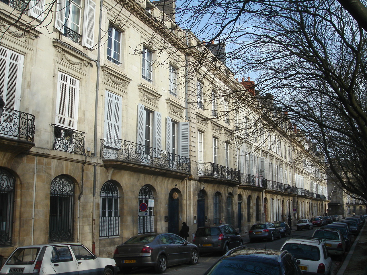 Cours Xavier Arnozan dans le quartier des Chartrons à Bordeaux, France.